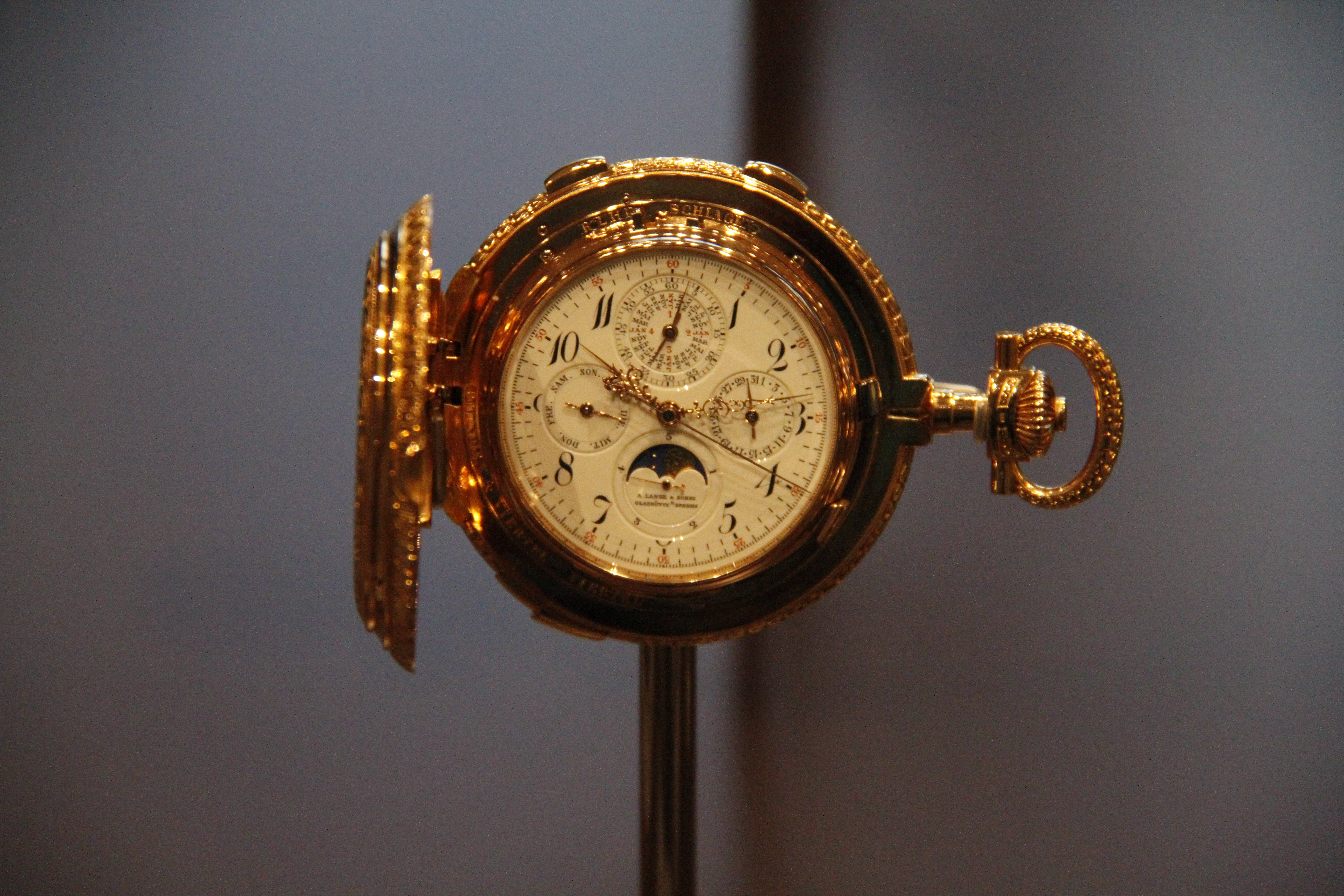 Die Taschenuhr Modell '42500' von A. Lange & Söhne – gefertigt 1902